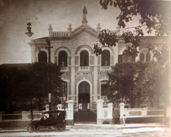 Aspecto da fachada da edificação do Sanatório (atual Hospital) Santa Catarina, no ano de sua inauguração.